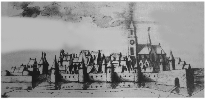 bredevoort